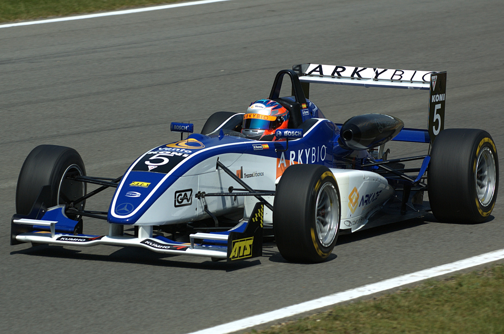 F3 - Alejandro Núñez